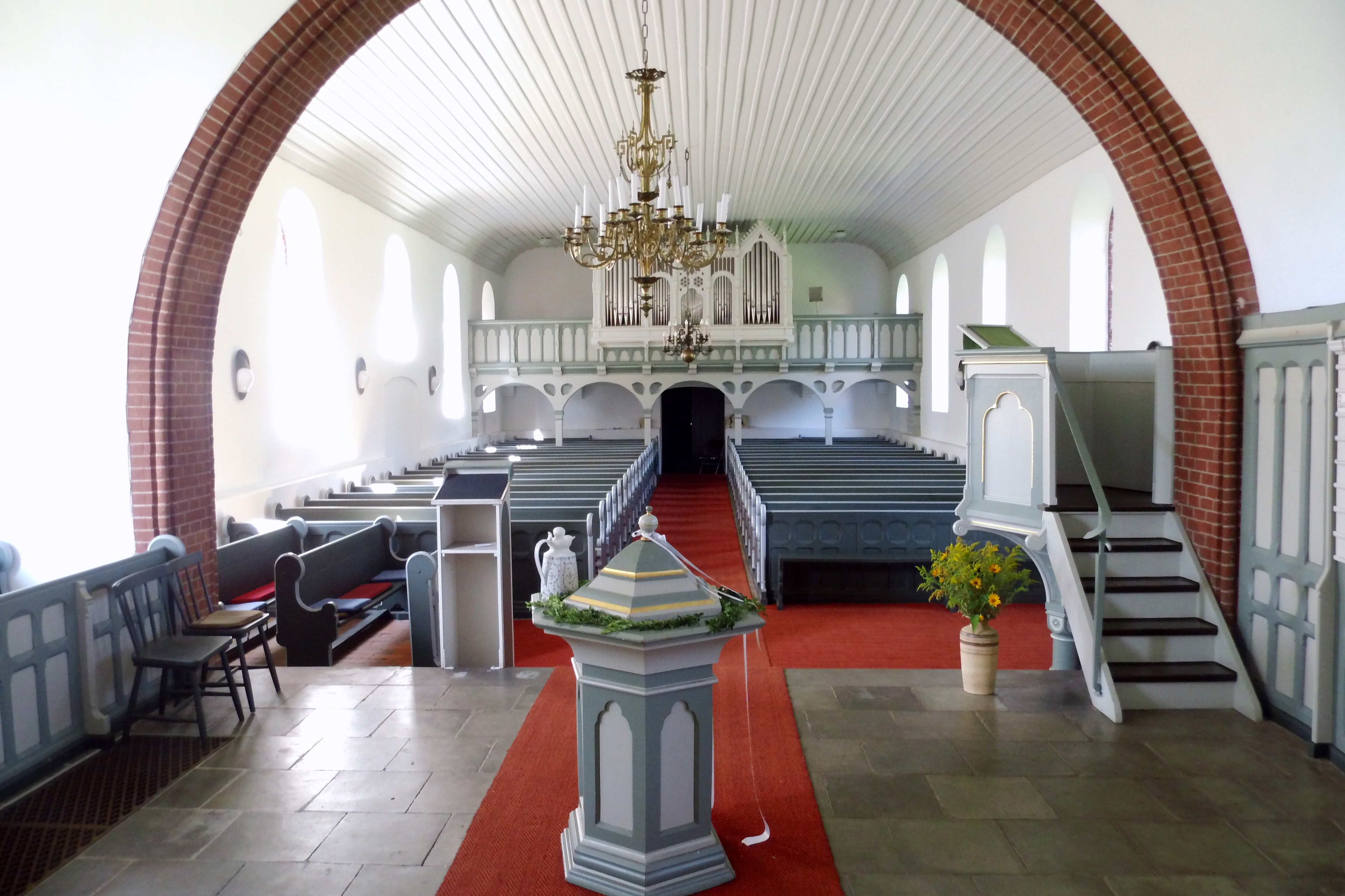 Inneres der Evangelisch-lutherischen Kirche in Prezelle (Samtgemeinde Gatow), Landkreis Lüchow-Dannebberg, Niedersachsen, Deutschalnd